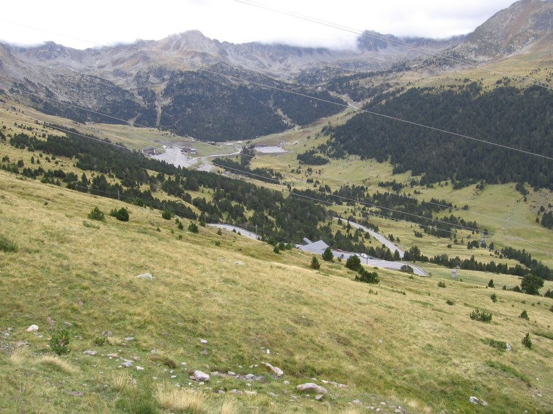 Paisaje de Andorra. Landscape of Andorra, near French border